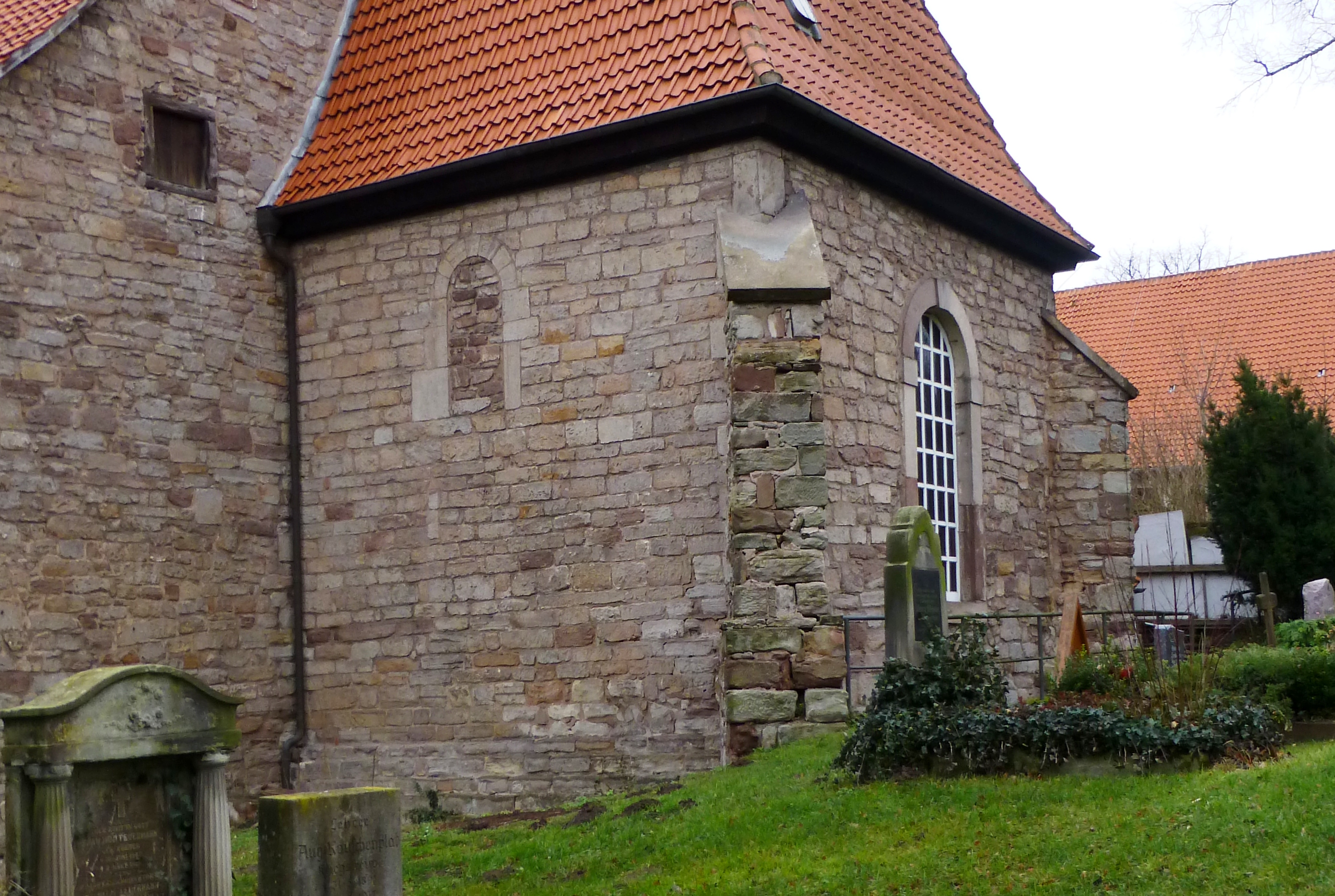 Außenwand des Chorraums der ev.-luth. Kirche St. Christophorus in Reinhausen, Gemeinde Gleichen, Südniedersachsen. Das Mauerwerk der Südwand des Chorraums mit dem Rundbogenfenster hebt sich deutlich von dem der anderen Wände und Strebepfeiler ab und geht wahrscheinlich auf die ehemalige Burgkirche zurück.